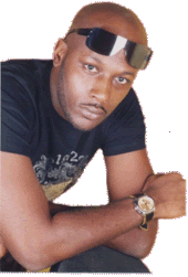 Rudy Rudiction, un des meilleurs rappeurs d'Afrique de l'ouest